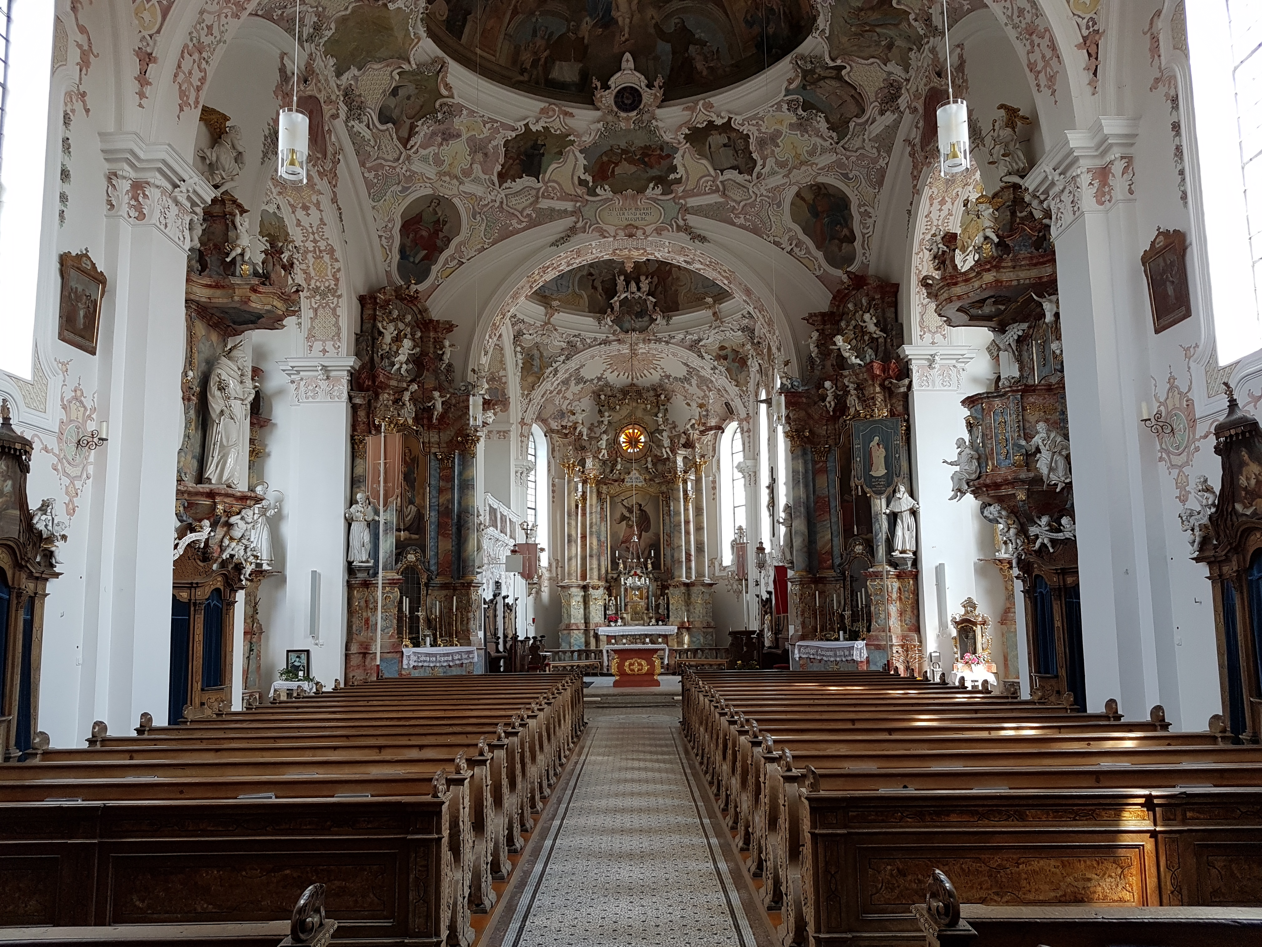 Sankt Michael (Bertoldshofen)